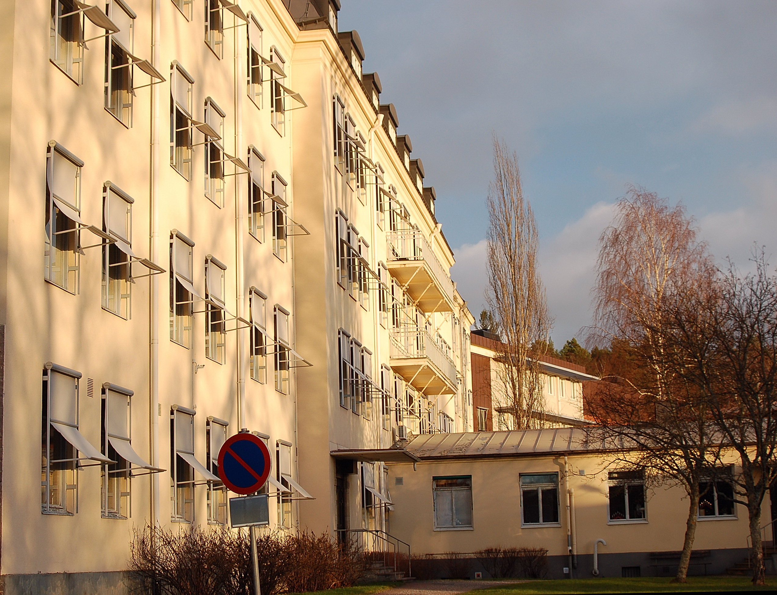 Arvika sjukhus den äldre delen.